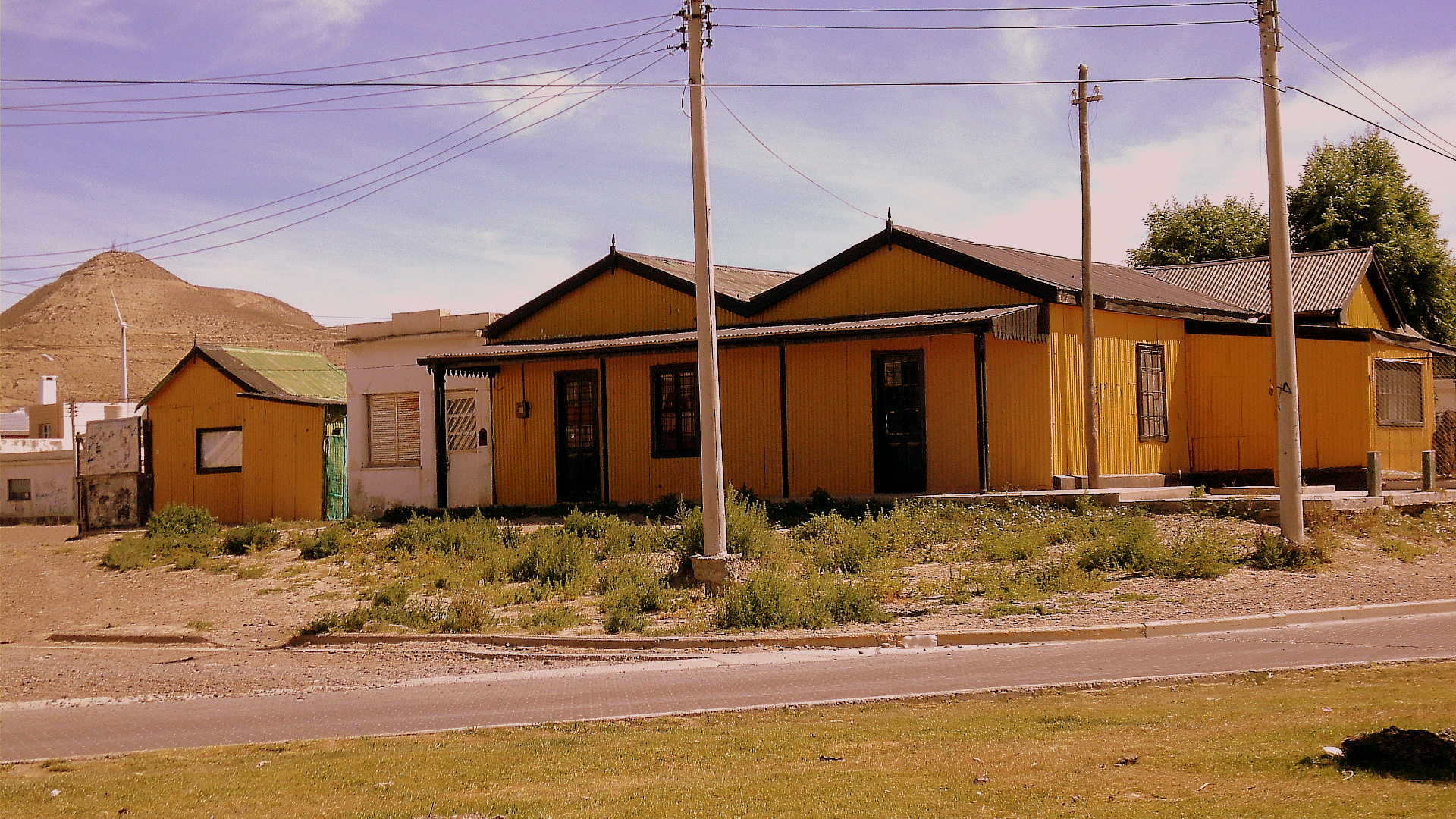 antigua estación ferroviaria en Presidente Ortiz, km 5